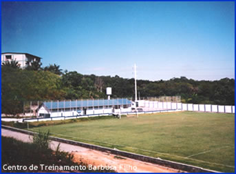 Centro de Treinamentos Barbosa Filho, parte do patrimonio do Nacional Futebol Clube de Manaus